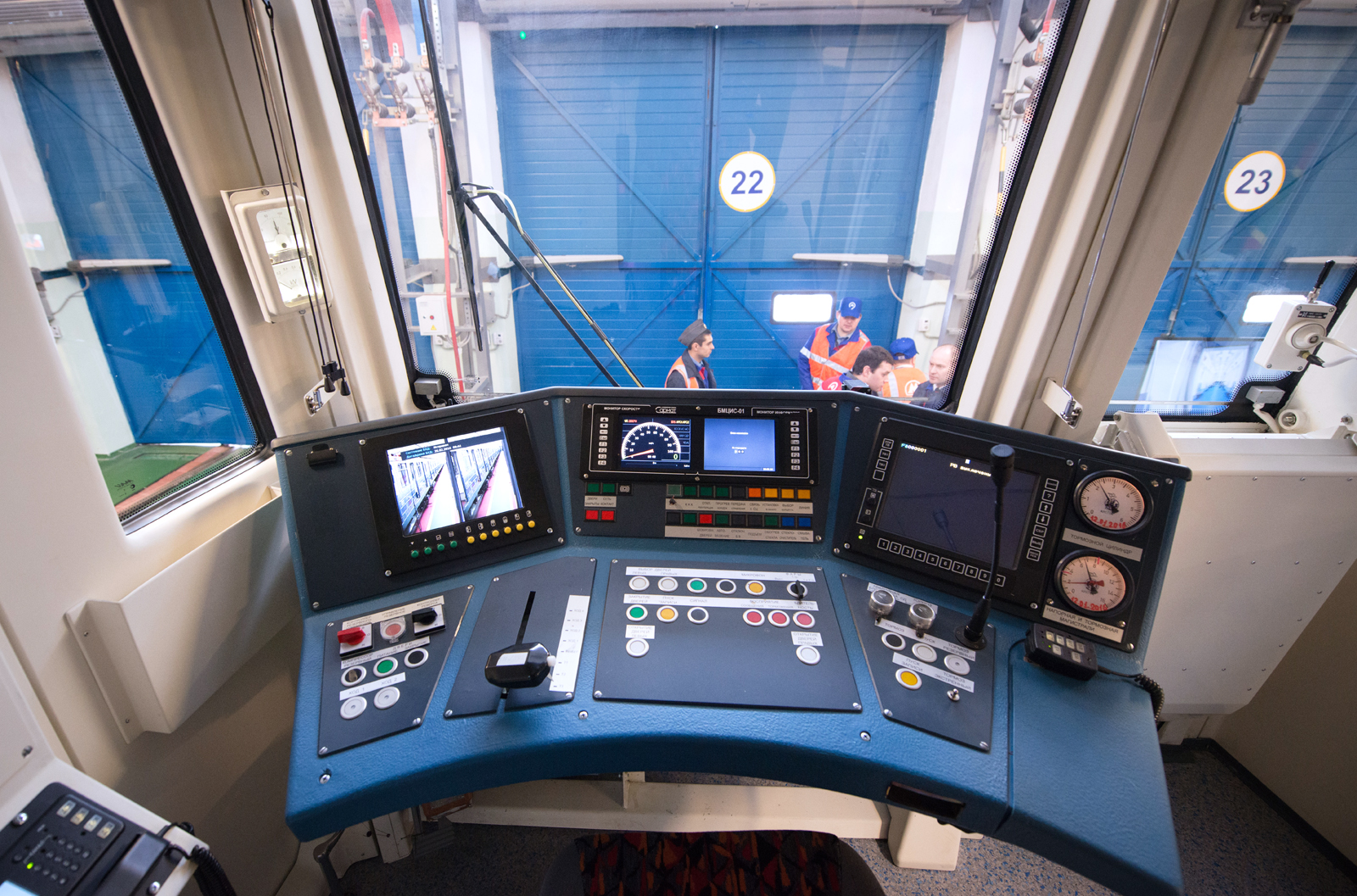 Пульт машиниста вагона 81-760А